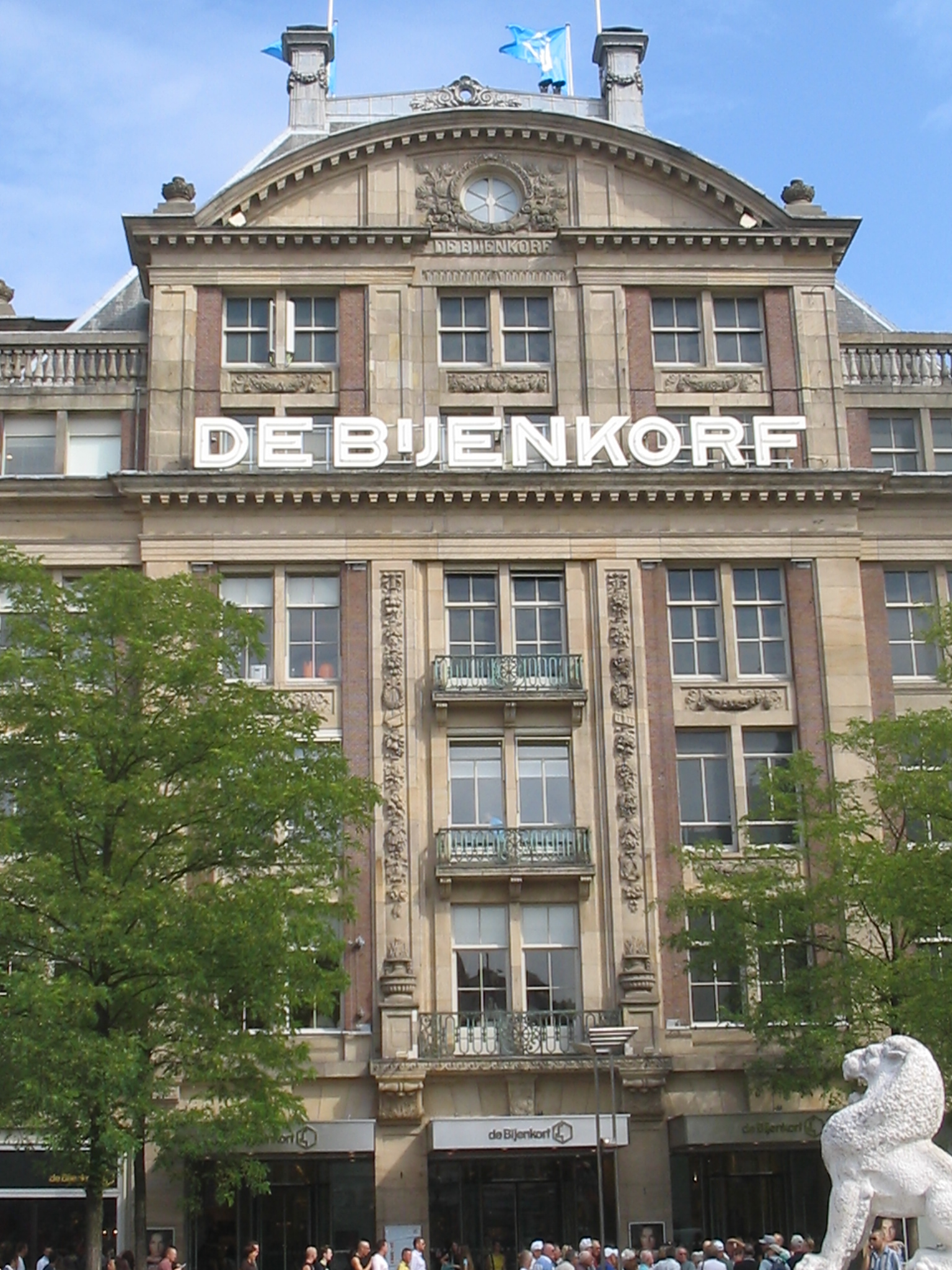 Bijenkorf, Amsterdam. Sept. 2005